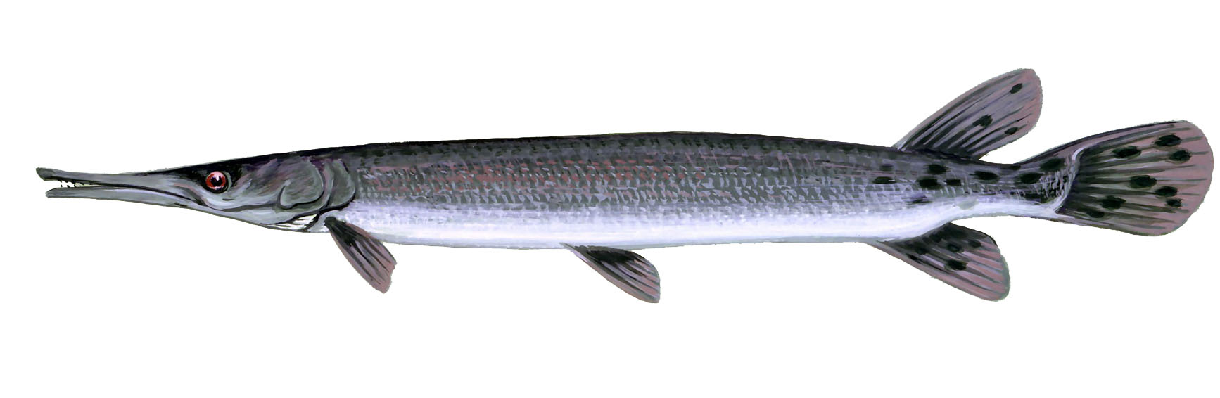 Shortnose gar. Lepisosteus platostomus. Photo from US FWS.